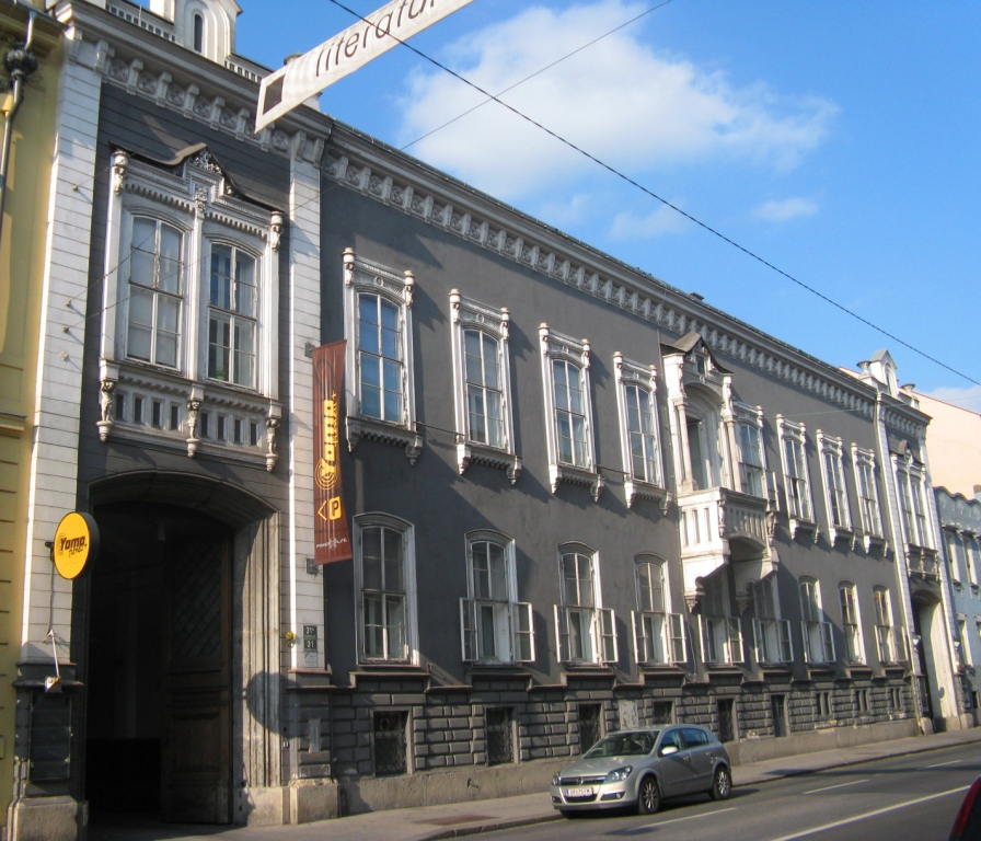 Ehem. Stadtpalais Mayr-Melnhof, Graz Geidorf